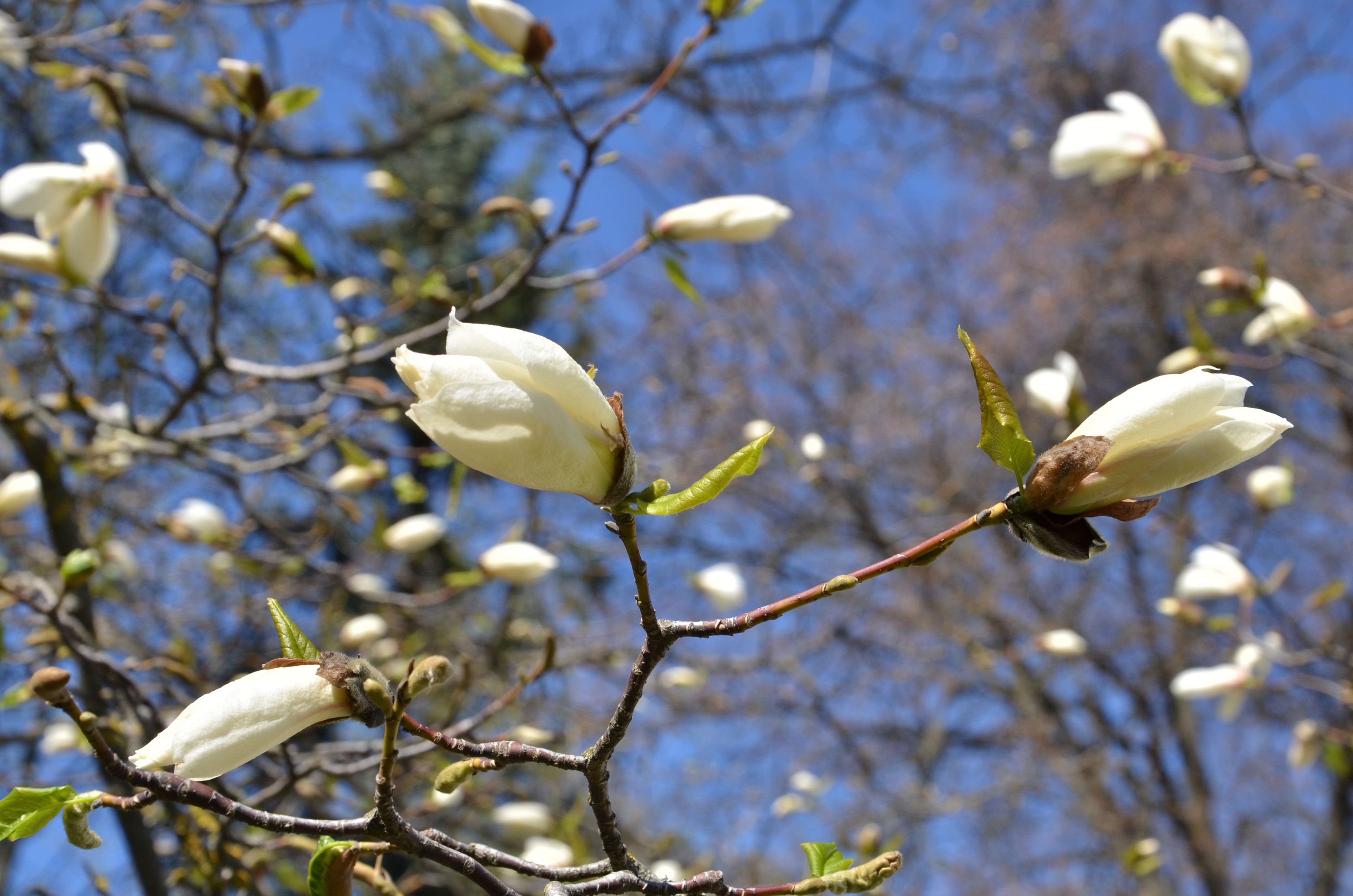 Весняний цвіт «Тернопільських магнолій».